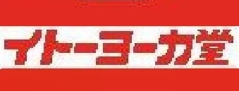 イトーヨーカ堂の初代ロゴ